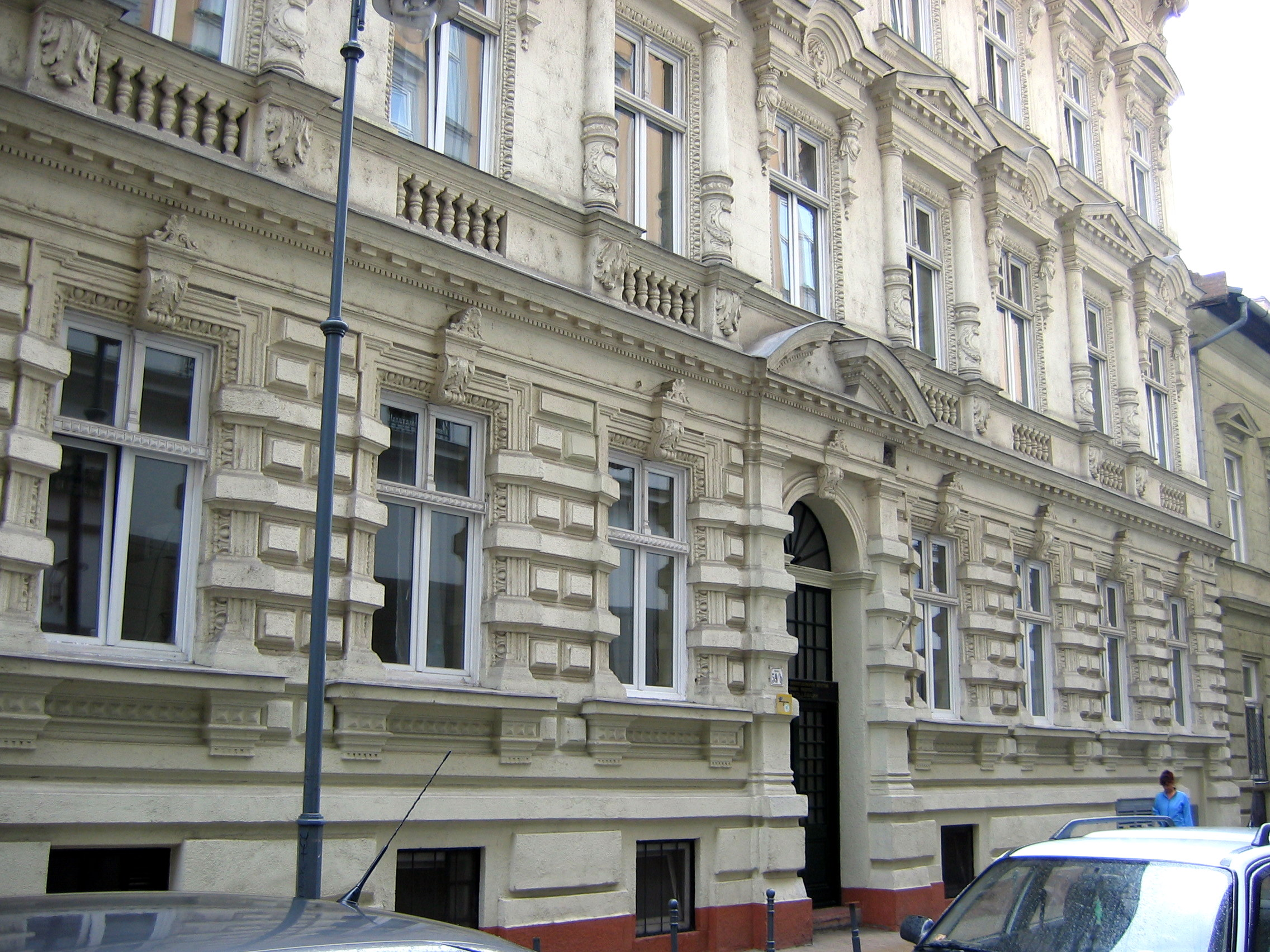 A Korányi Frigyes Szakkollégium kívülről (1074 Budapest, Hársfa utca 59/B)